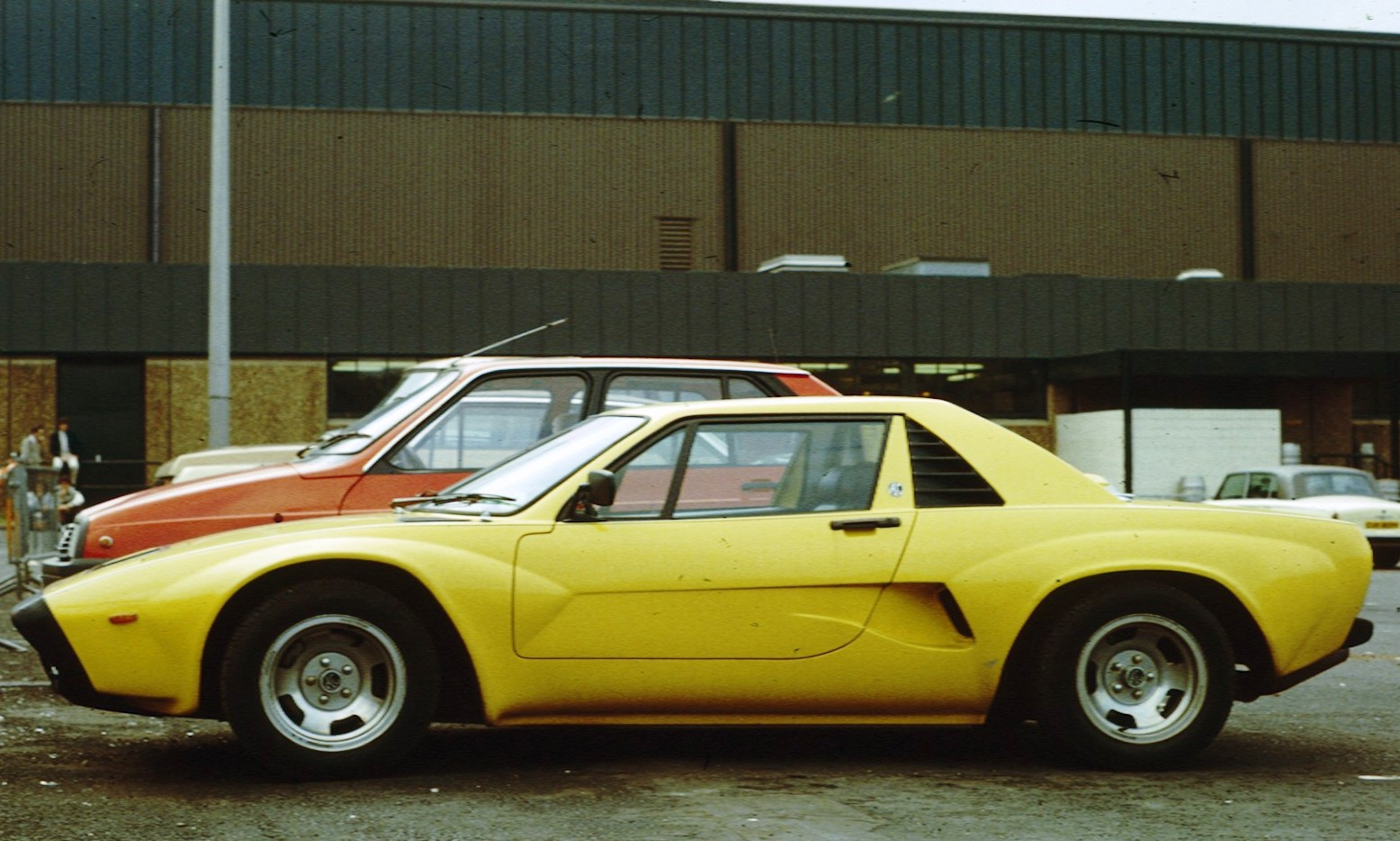 AC ME3000 in England